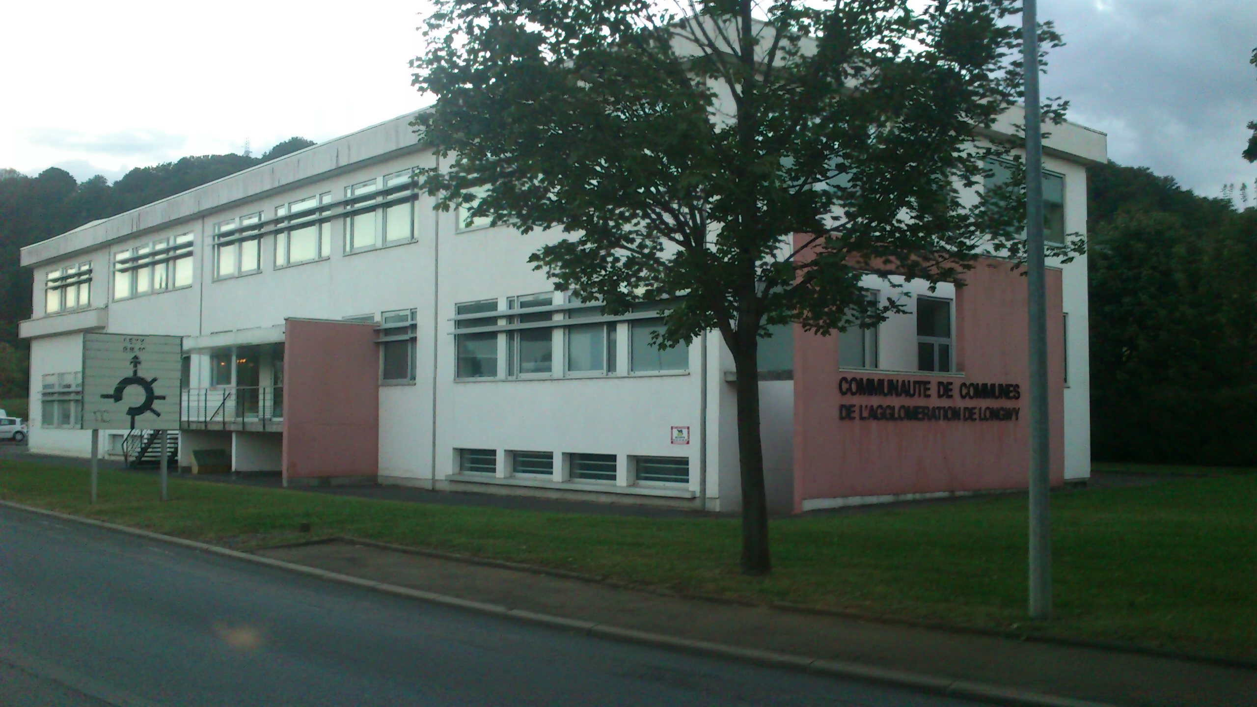 Batiment de la CCAL à Réhon